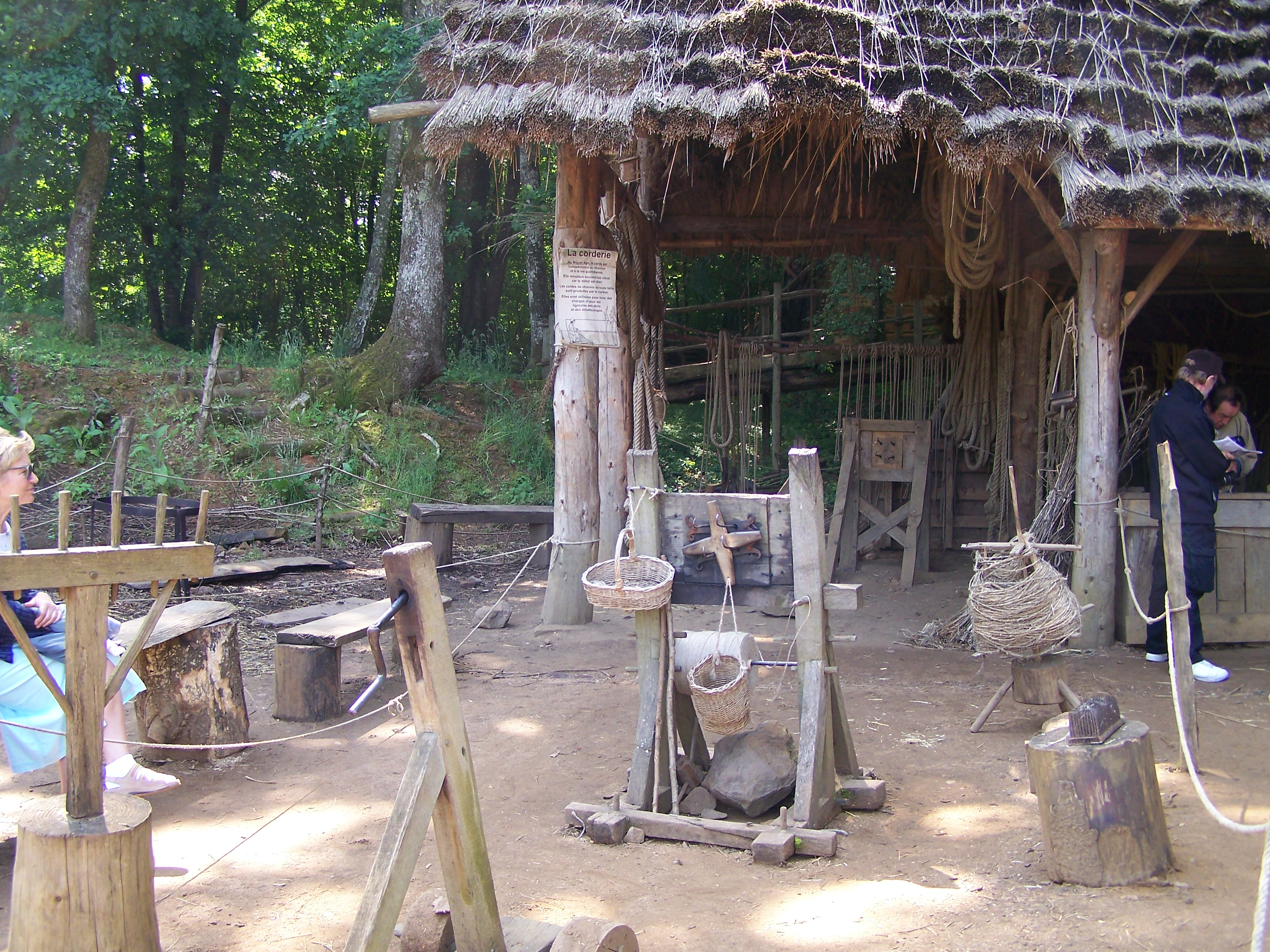 Chantier médiéval du château de Guédelon en juin 2008 (Treigny, Yonne, Bourgogne, France) : Atelier du Cordier